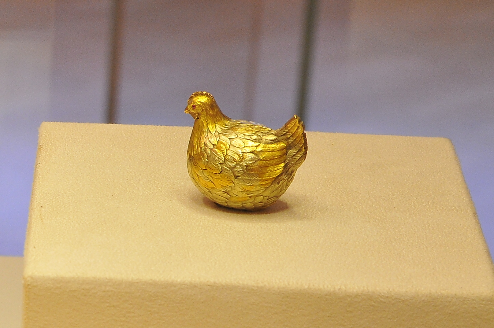 Императорское пасхальное яйцо "Курочка" из коллекции Музея Фаберже в Санкт-Петербурге.